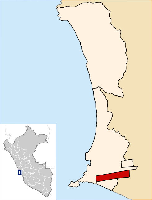 Bellavista.